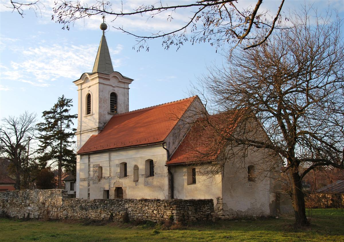 Református templom, Sóly (Veszprém megye)